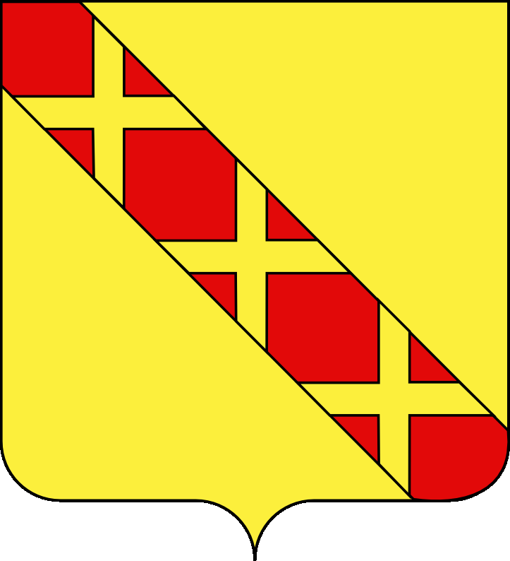 Bourgogne "d'or à la bande de gueules chargée de trois sautoirs d'or" source : blasons de Bourgogne tirés des armoriaux locaux, généraux et manuscrits, par Michel Marchand de 1975 à 2001